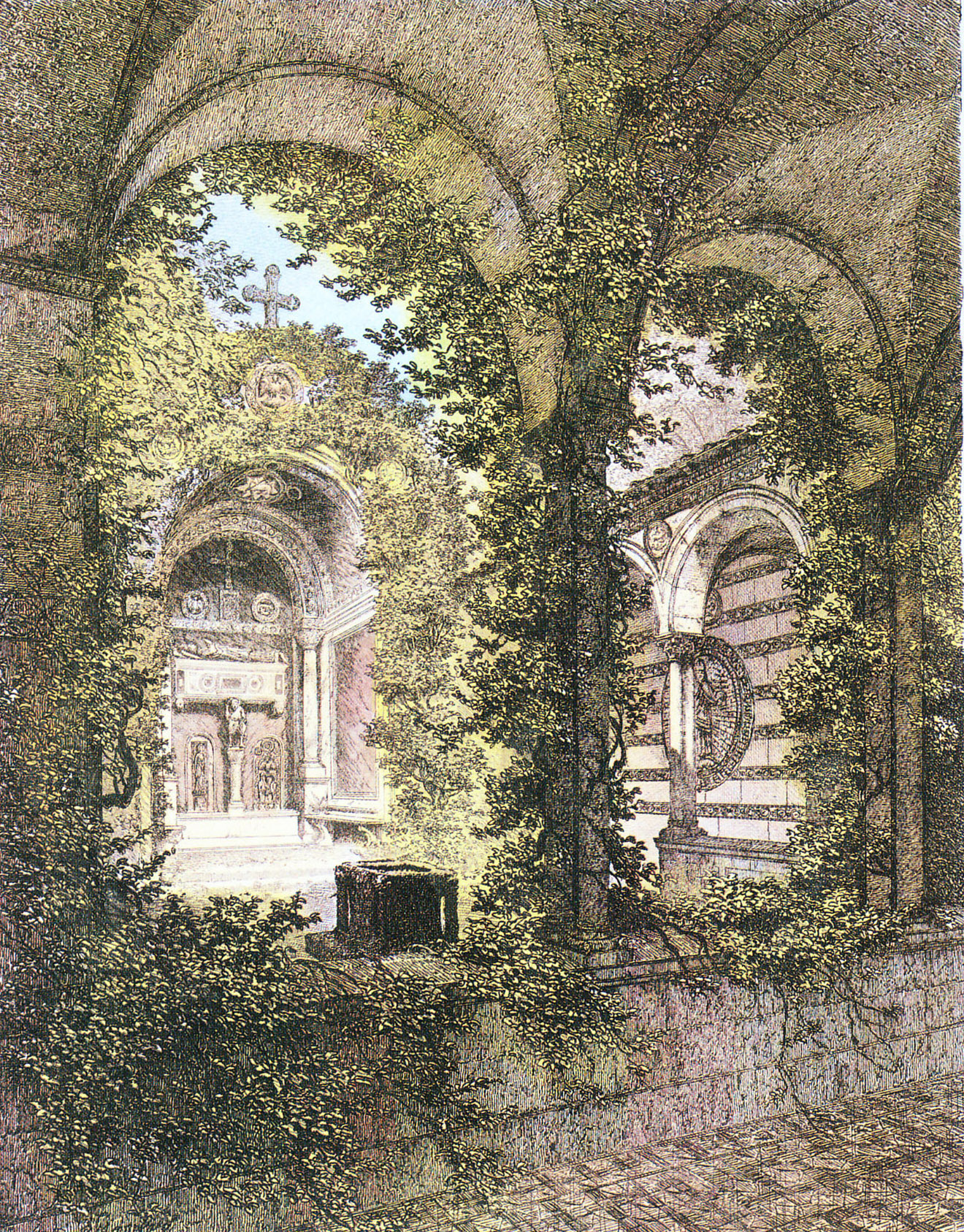 Das Innere des Klosterhofs in Klein-Glienicke, Radierung, um 1885